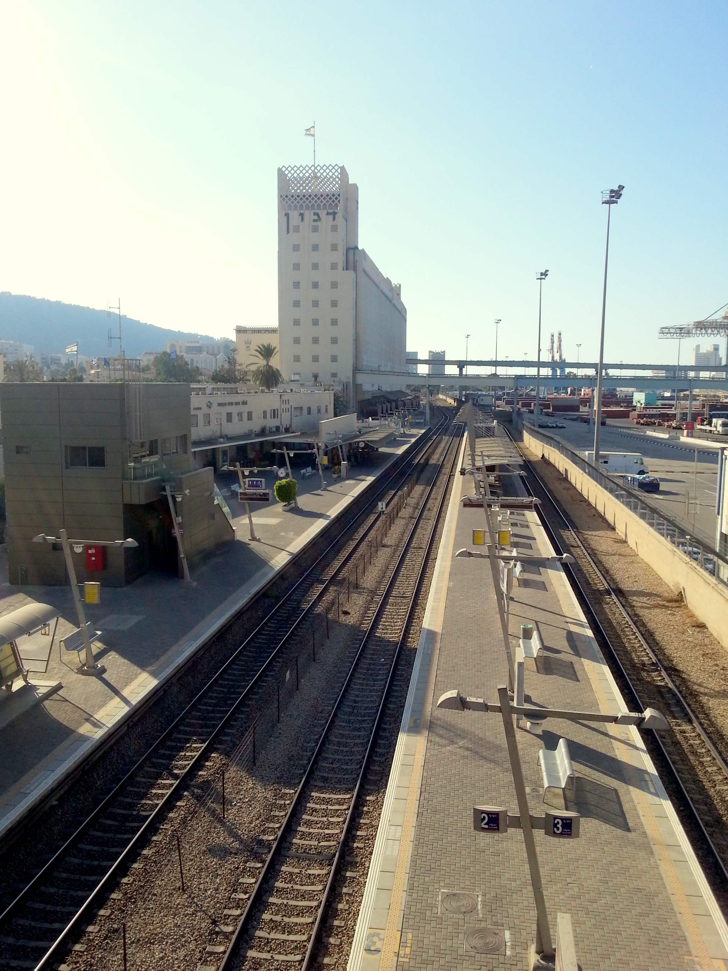 תחנת רכבת מרכז השמונה, 2015